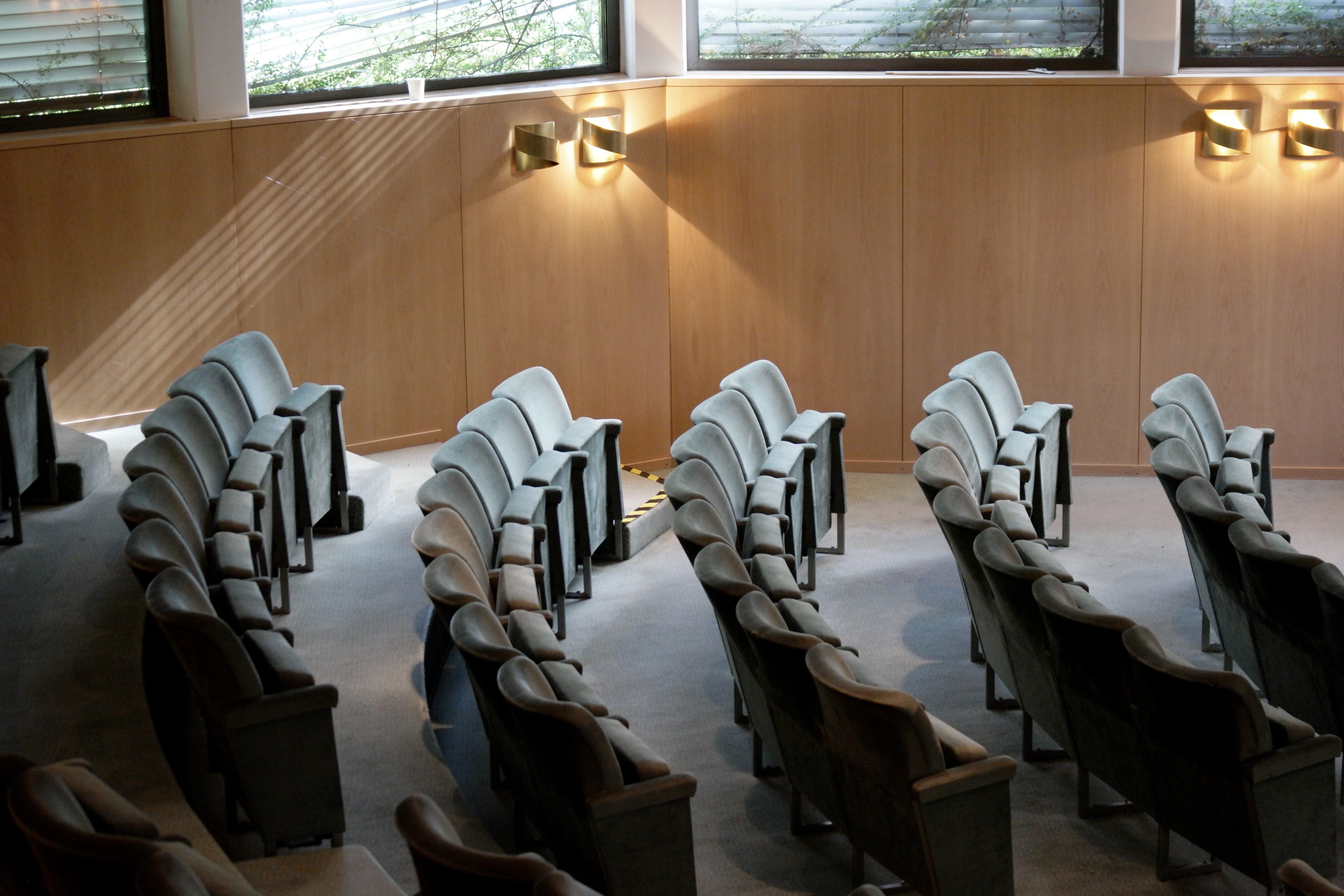 Egen bild av aulainteriör